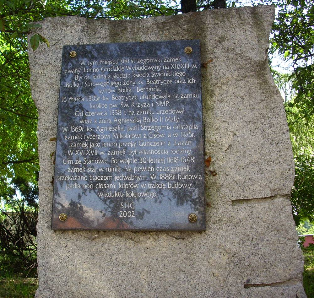 Tablica upamiętniająca zamek w Strzegomiu.